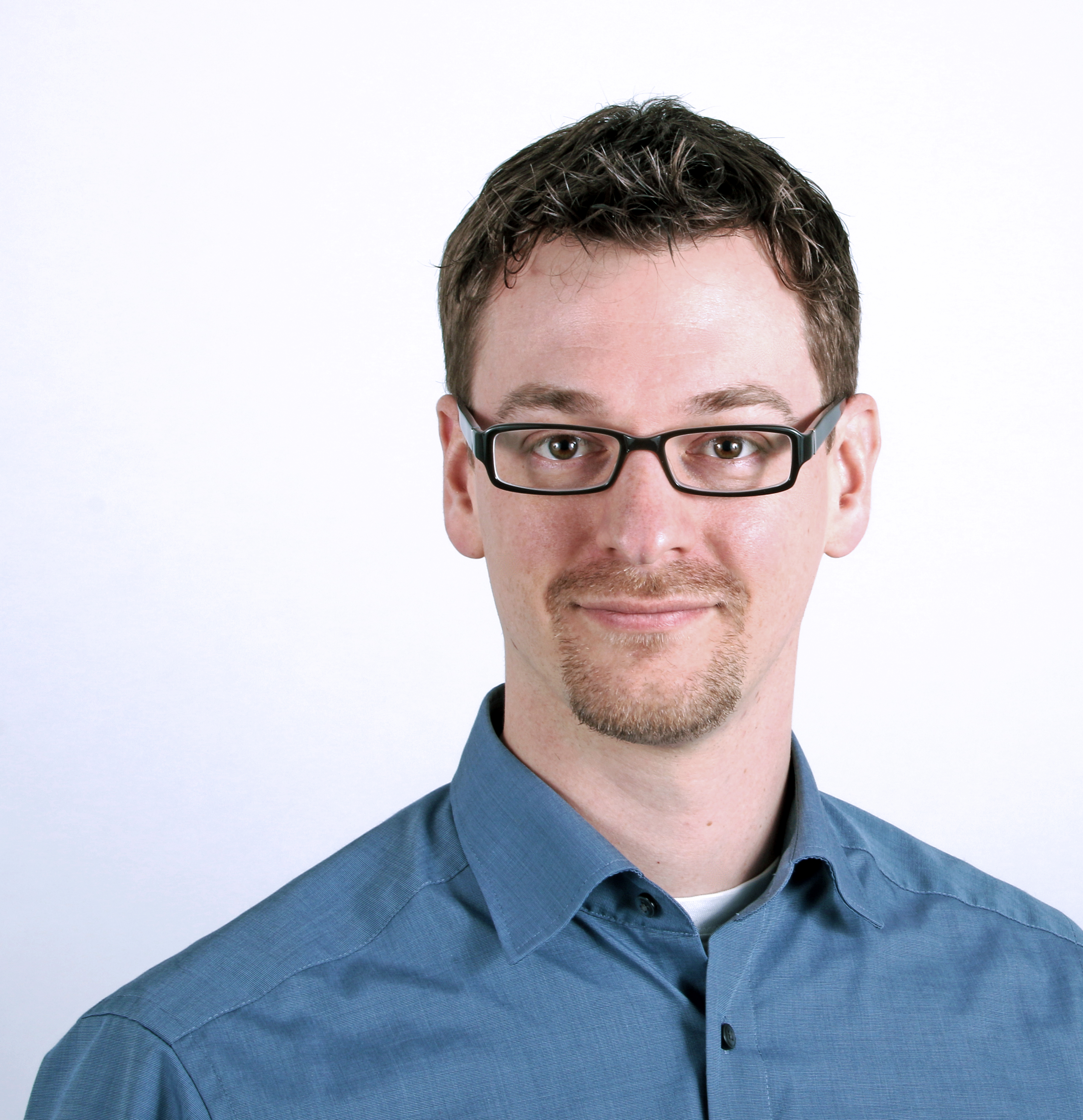 Portrait, Sebastian Erlhofer